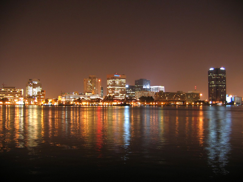 September 18, 2006